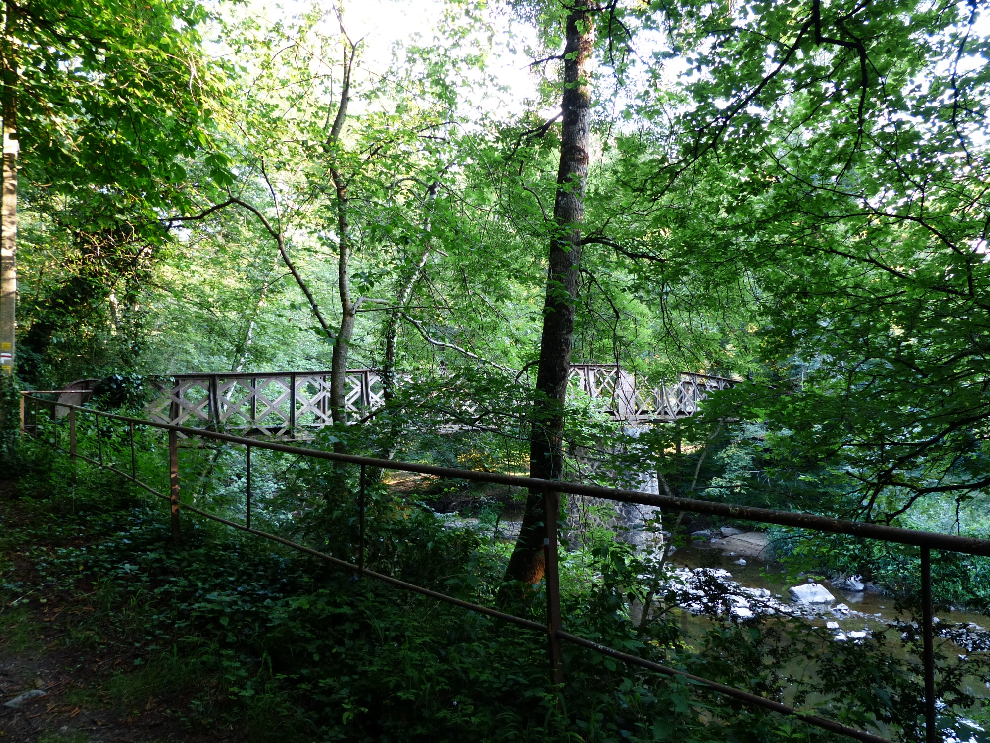 Chantelle (Allier). Passerelle sur la Bouble, au pied de l'abbaye.